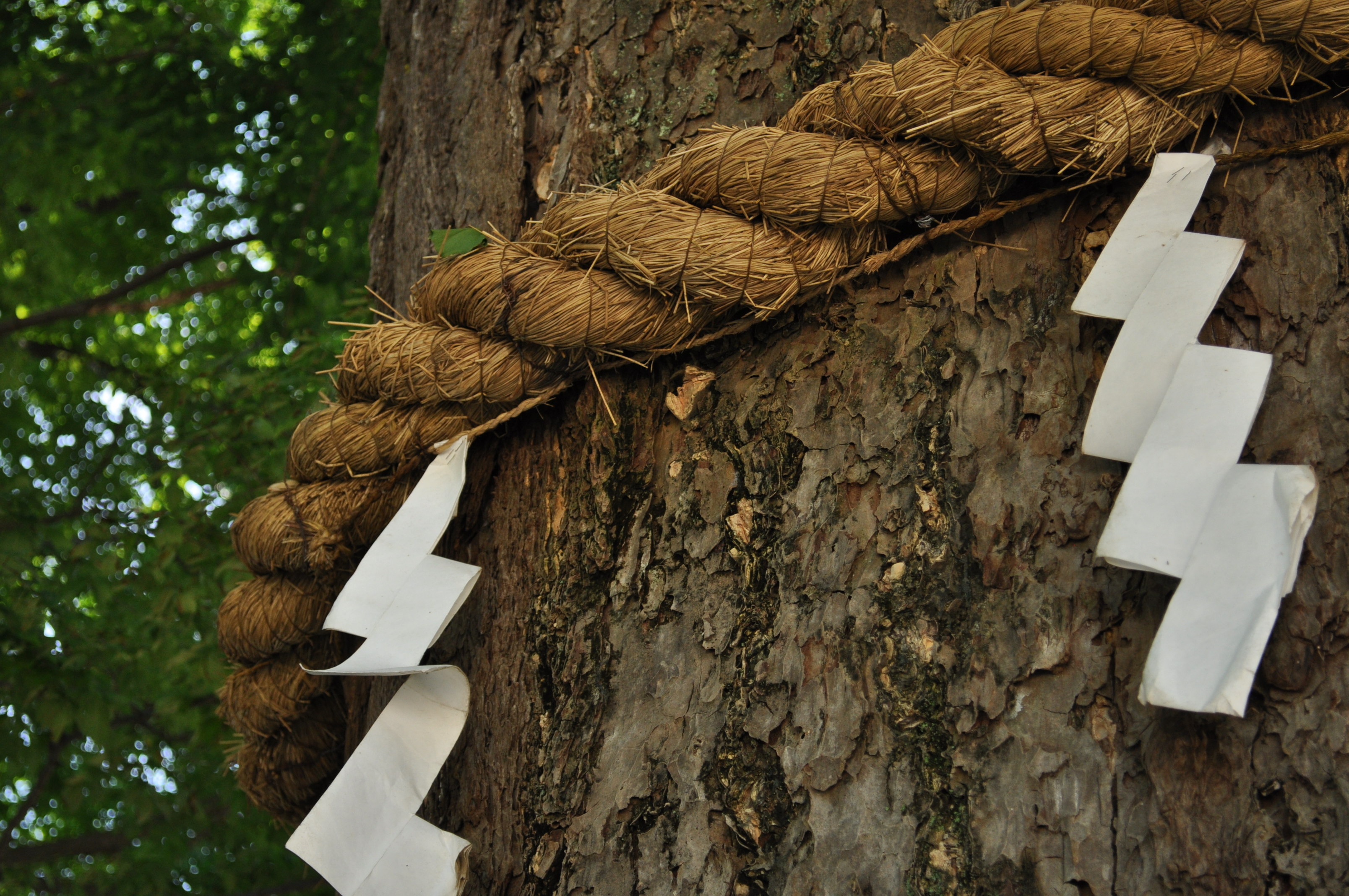 鎮守の杜の大木に捲かれた注連縄